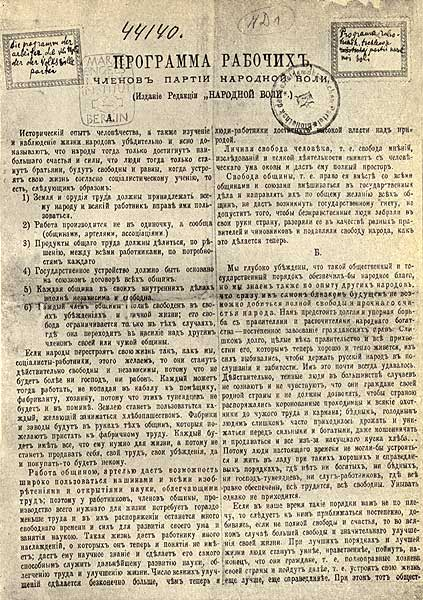 Programma dei membri operai di Narodnaja Volja. Copia appartenuta a Karl Marx